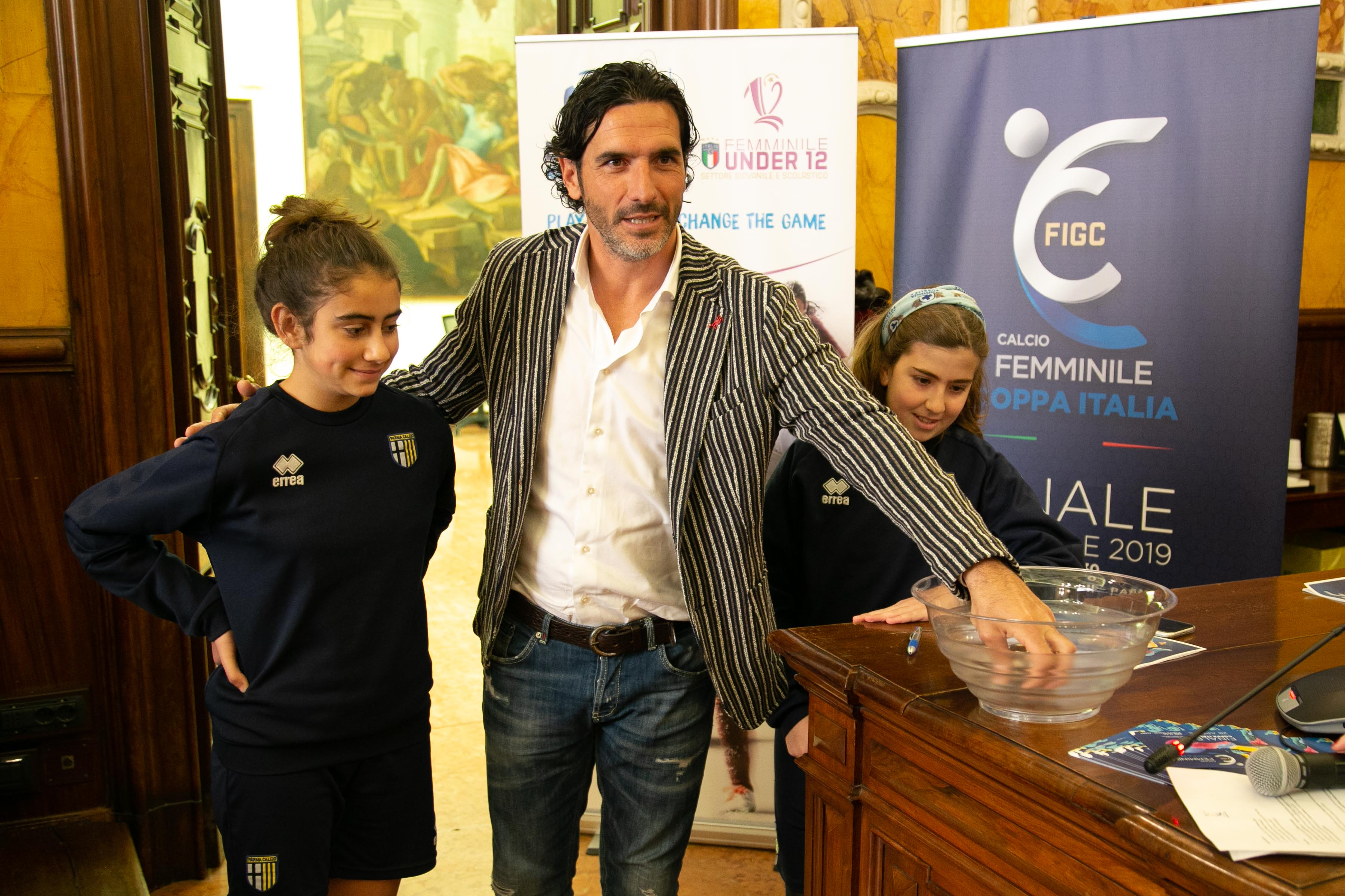 2019 04 18 Bosi cs Finale Coppa Italia Femminile-18